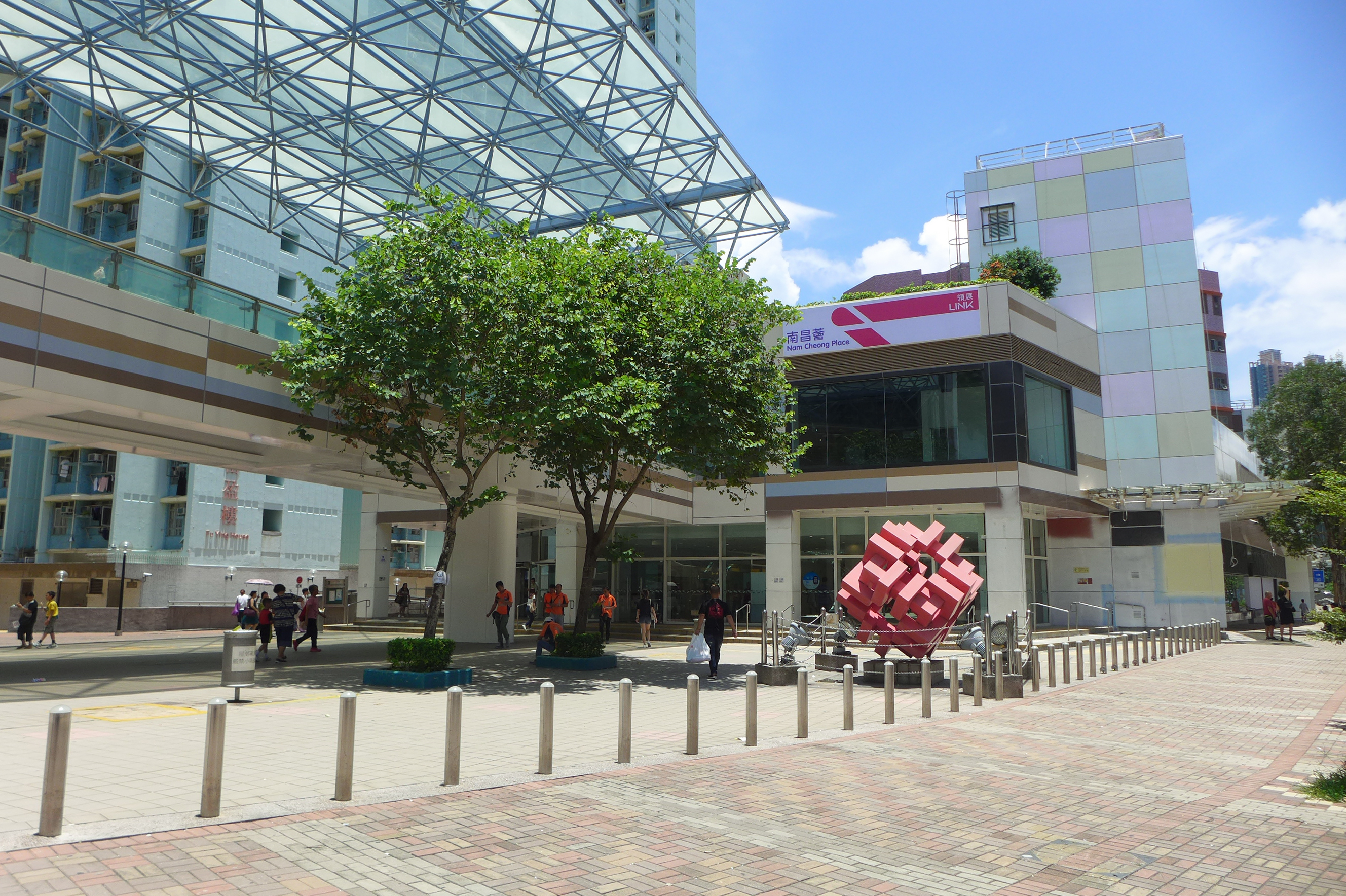 Nam Cheong Place